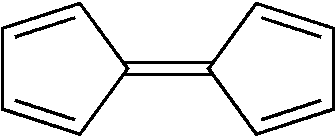 Struktur von Fulvalen